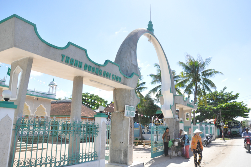 chua nguoi cham,Chau giang-Tan chau,An giang, photo by Dyt